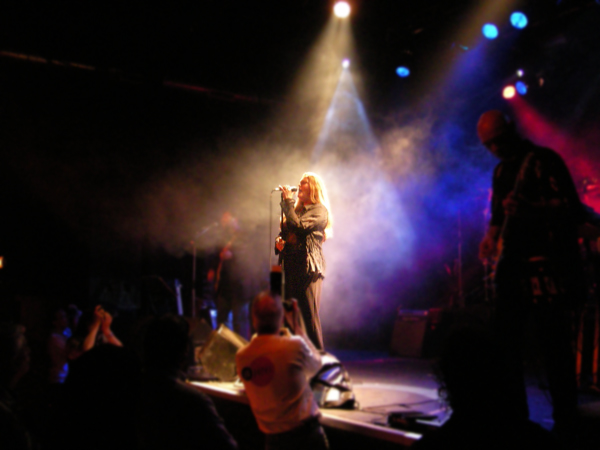 Cantora estadunidense Lana Lane tocando em Zaandam, Holanda do Norte, Países Baixos